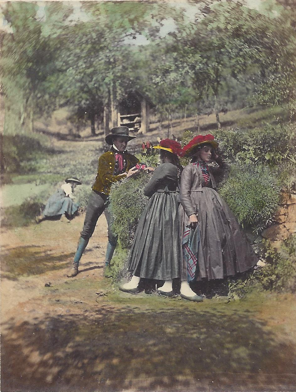 Ludovico Wolfgang Hart, getintete Fotographie N° 48, aus der Galerie universelle des Peuples: Hornberger Tracht, 1864